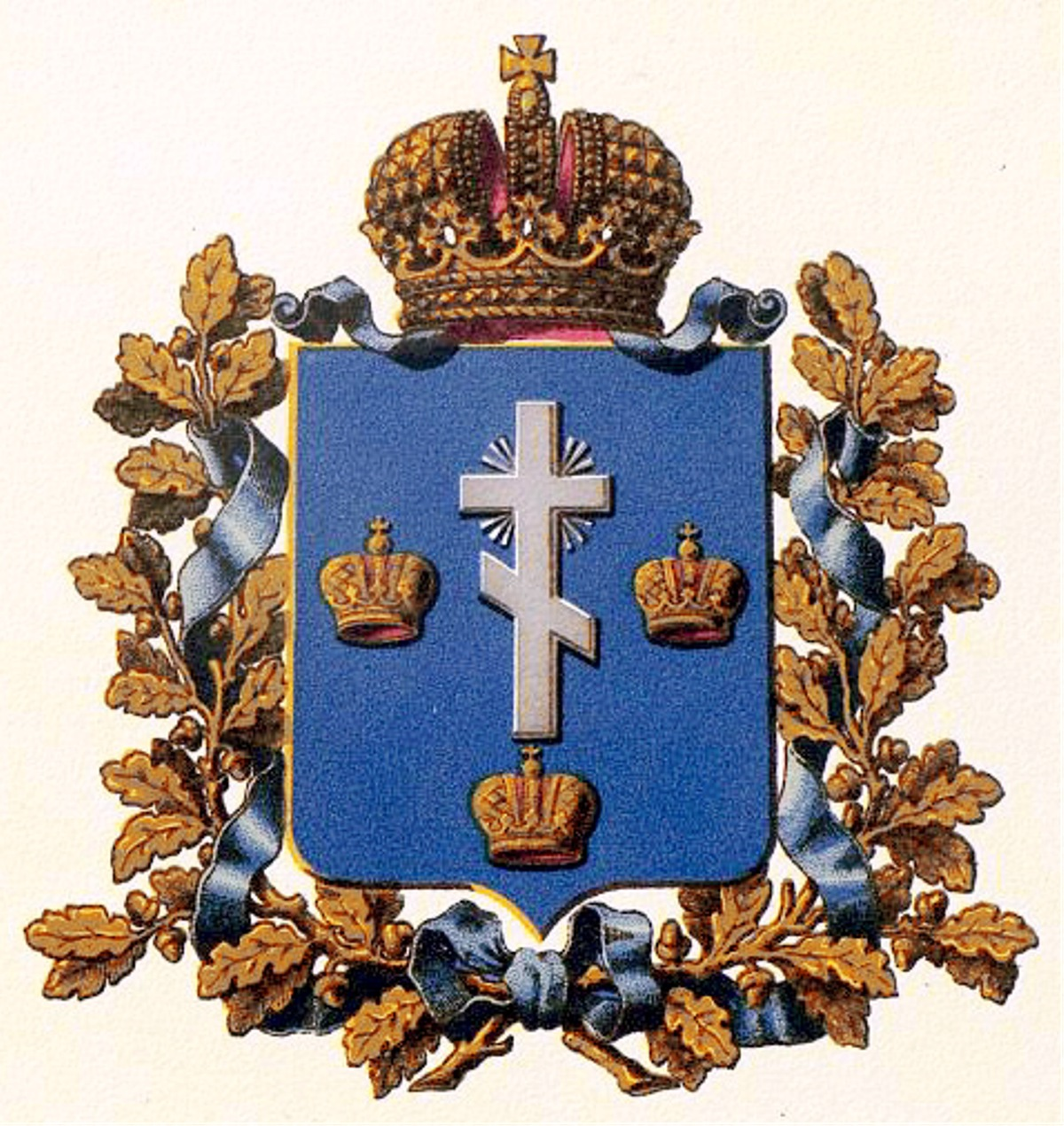 Official Russian Empire coat of arms Kherson Governorate. Герб Российской Империи Херсонской губернии в Гербовнике МВД. Утверждён Императором Всероссийским Александром Вторым в 1878 году.